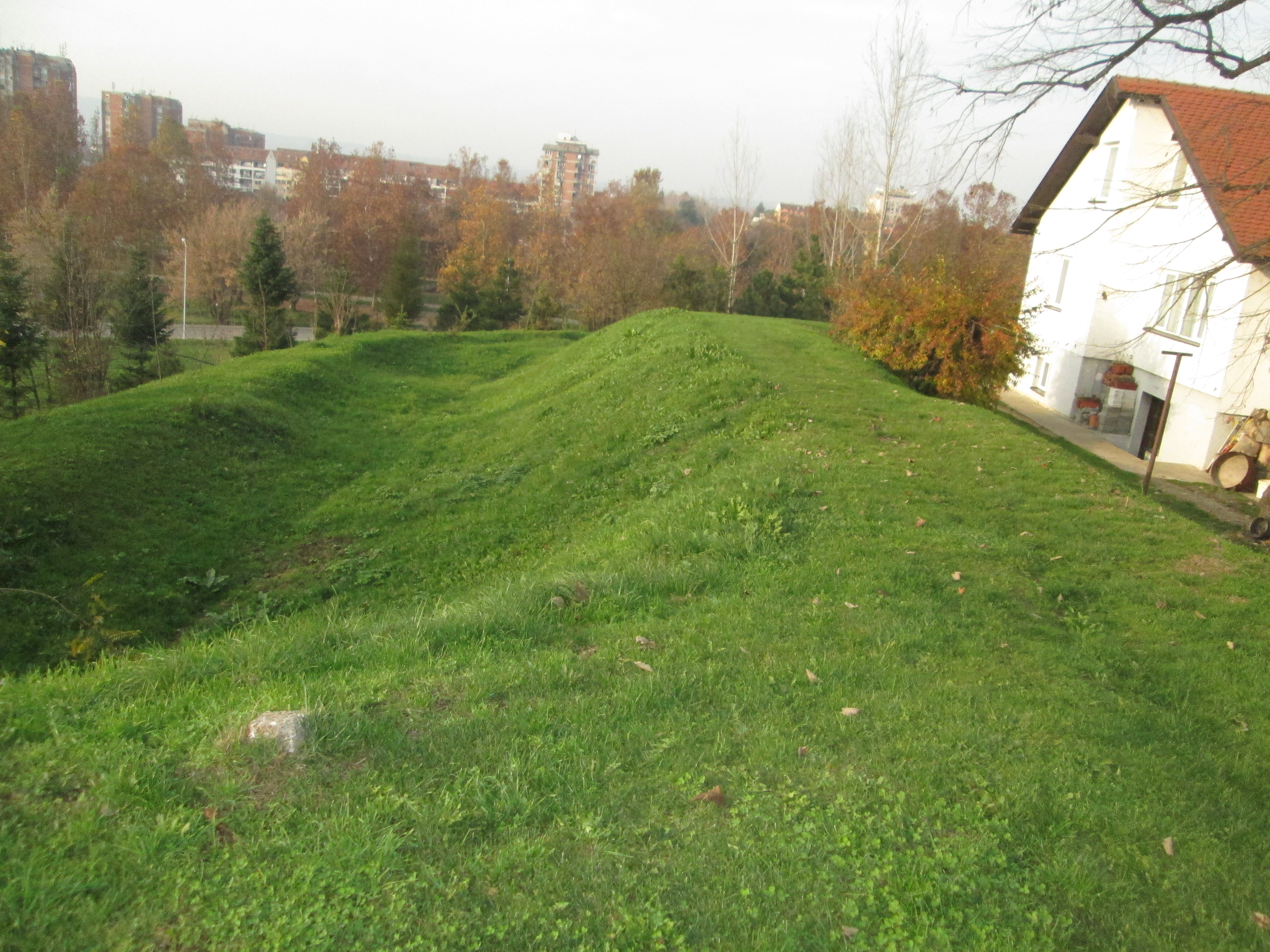 Српски (ћирилица): Остатак грудобрана лозничког шанца